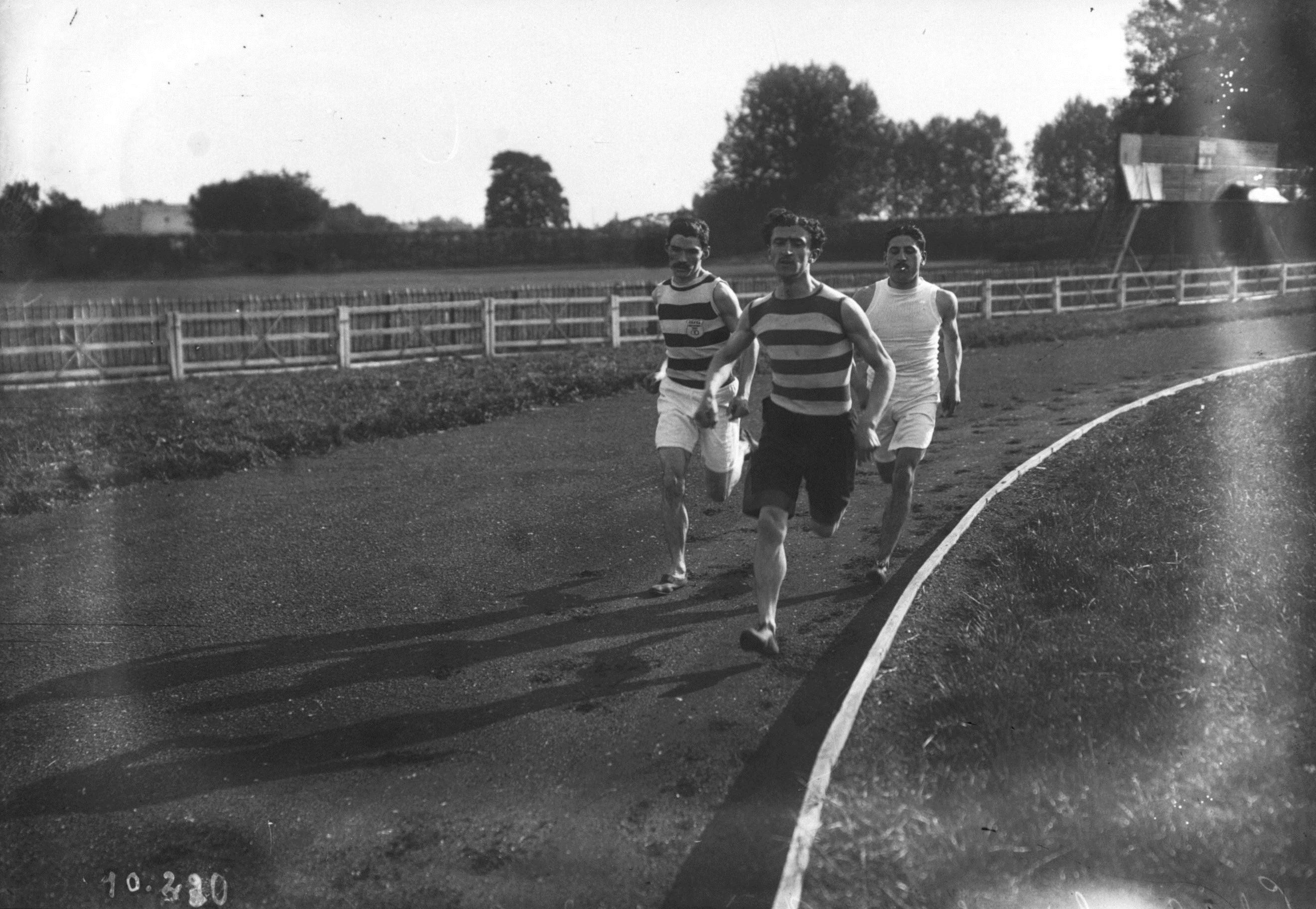 Colombes, le 30-5-1909, Jean Bouin [du Racing club de France] pendant sa tentative du record de l'heure : 18 kilomètres 267 mètres 70 centimètres.